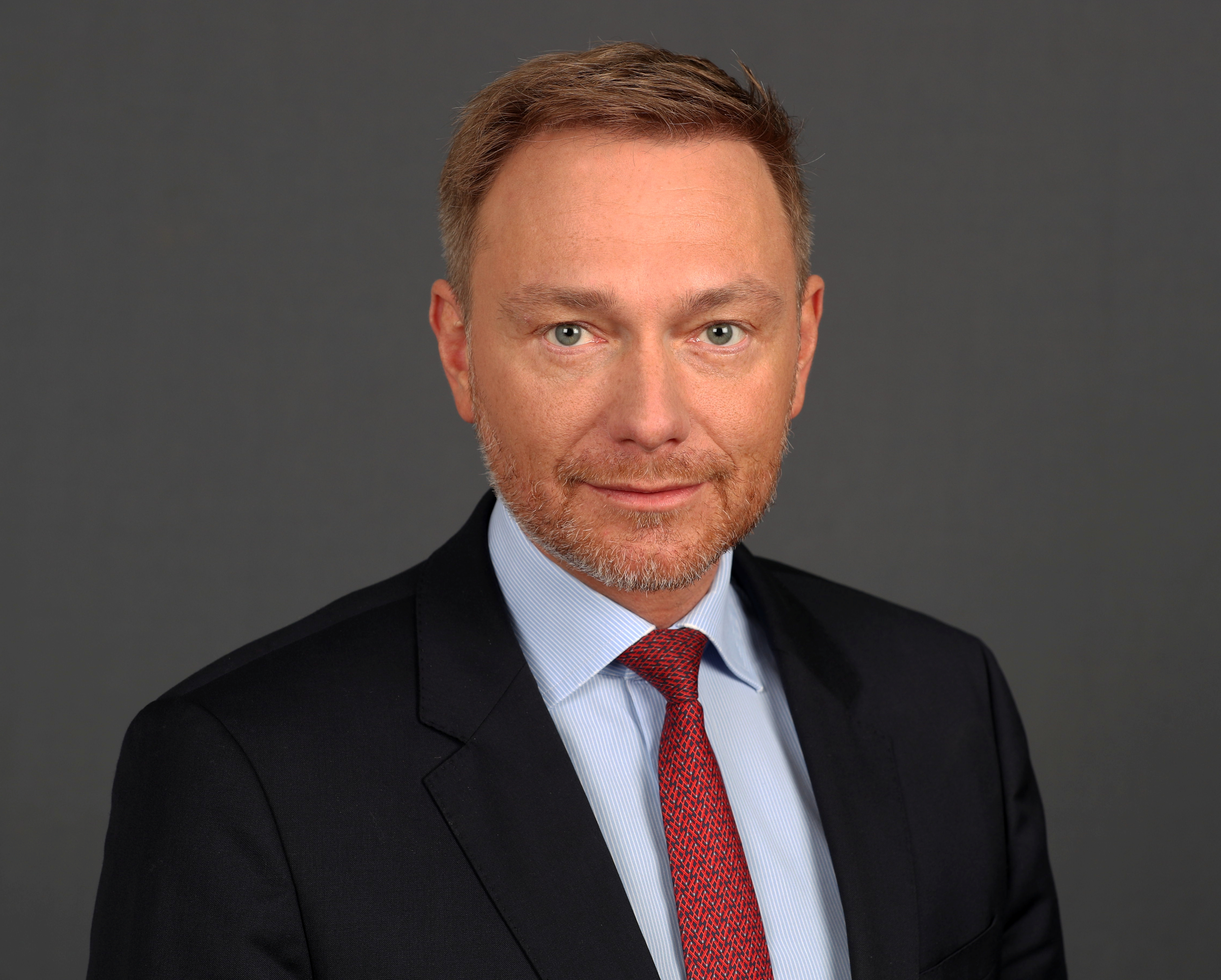 Christian Lindner, FDP